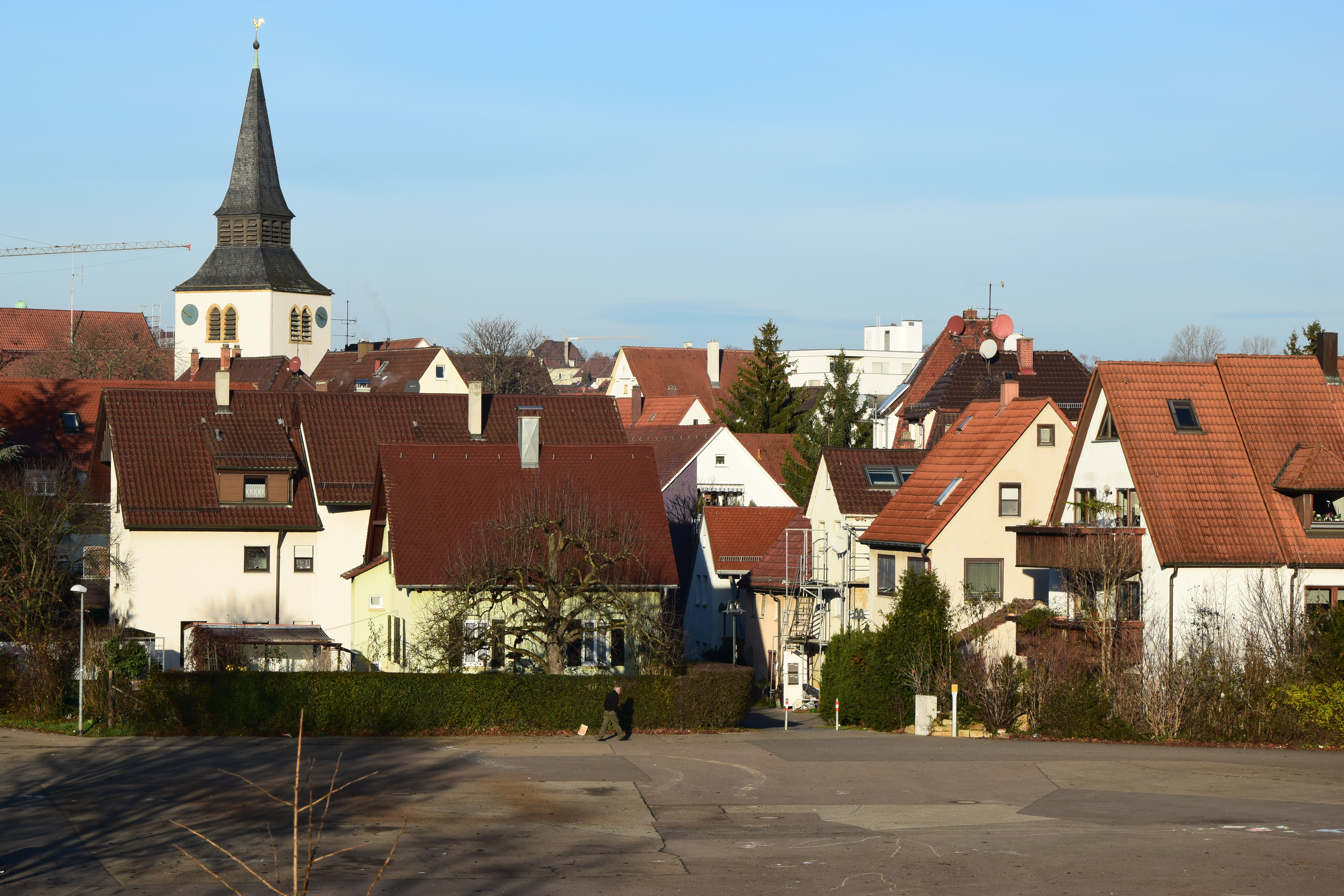 Stuttgart-Zuffenhausen vom La-Ferté-Steg aus gesehen, im Vordergrund der Kelterplatz